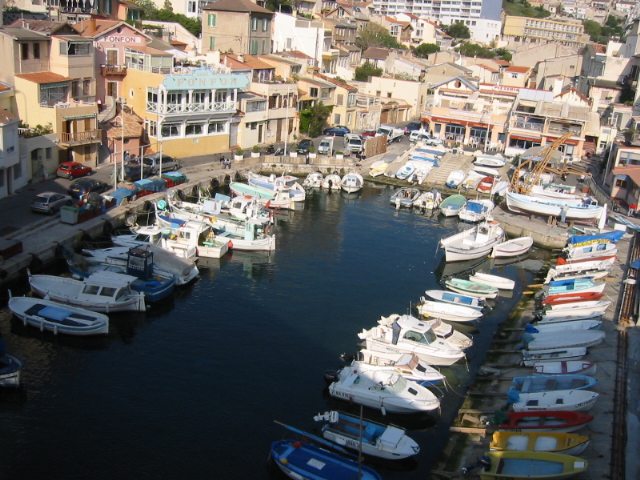 Vallon des Auffes (Marseille, France)